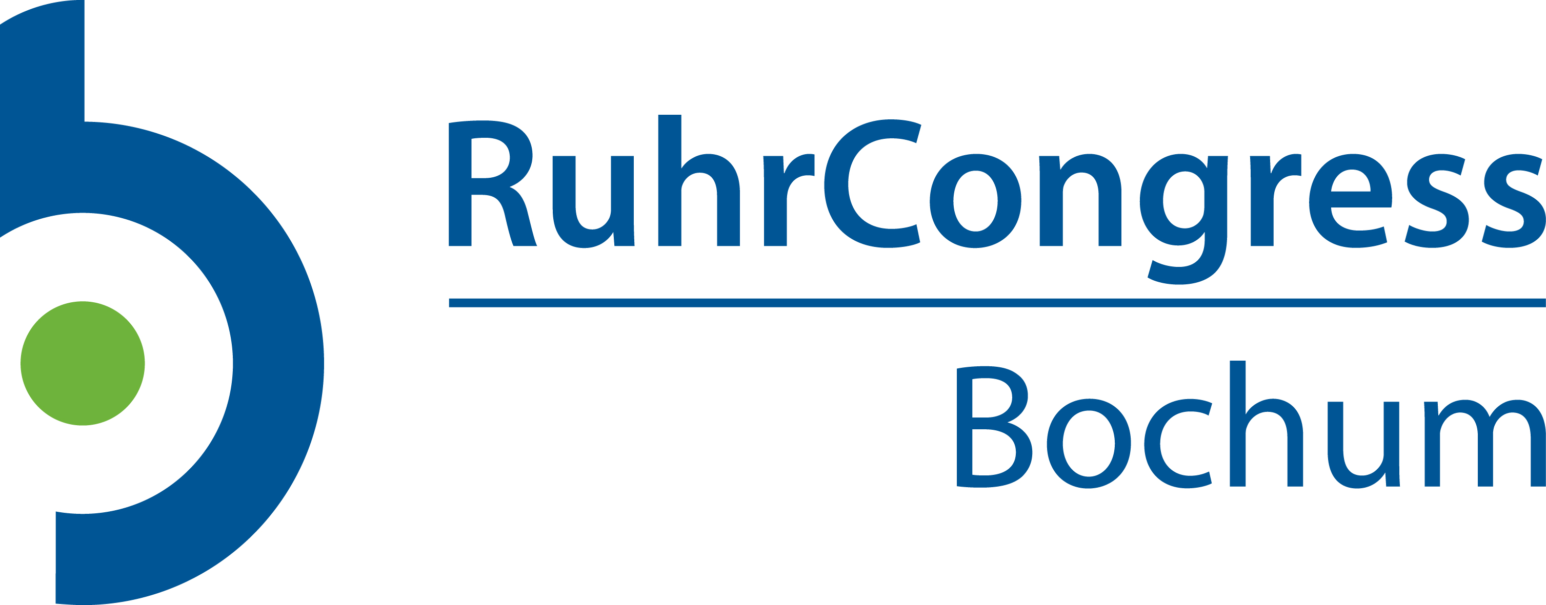 Offizielles Logo des RuhrCongress Bochum